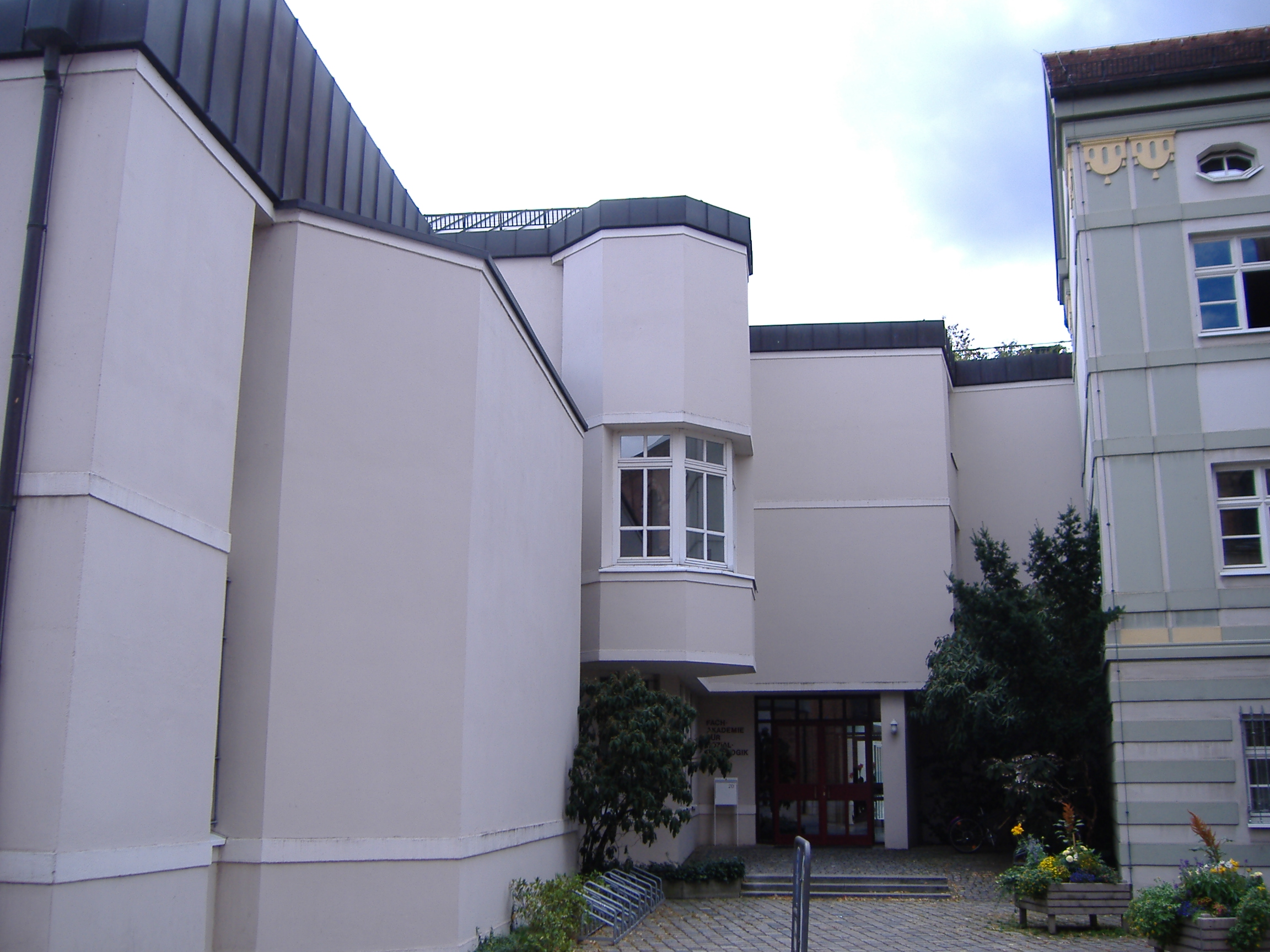 Fachakademie für Sozialpädagogik Eichstätt